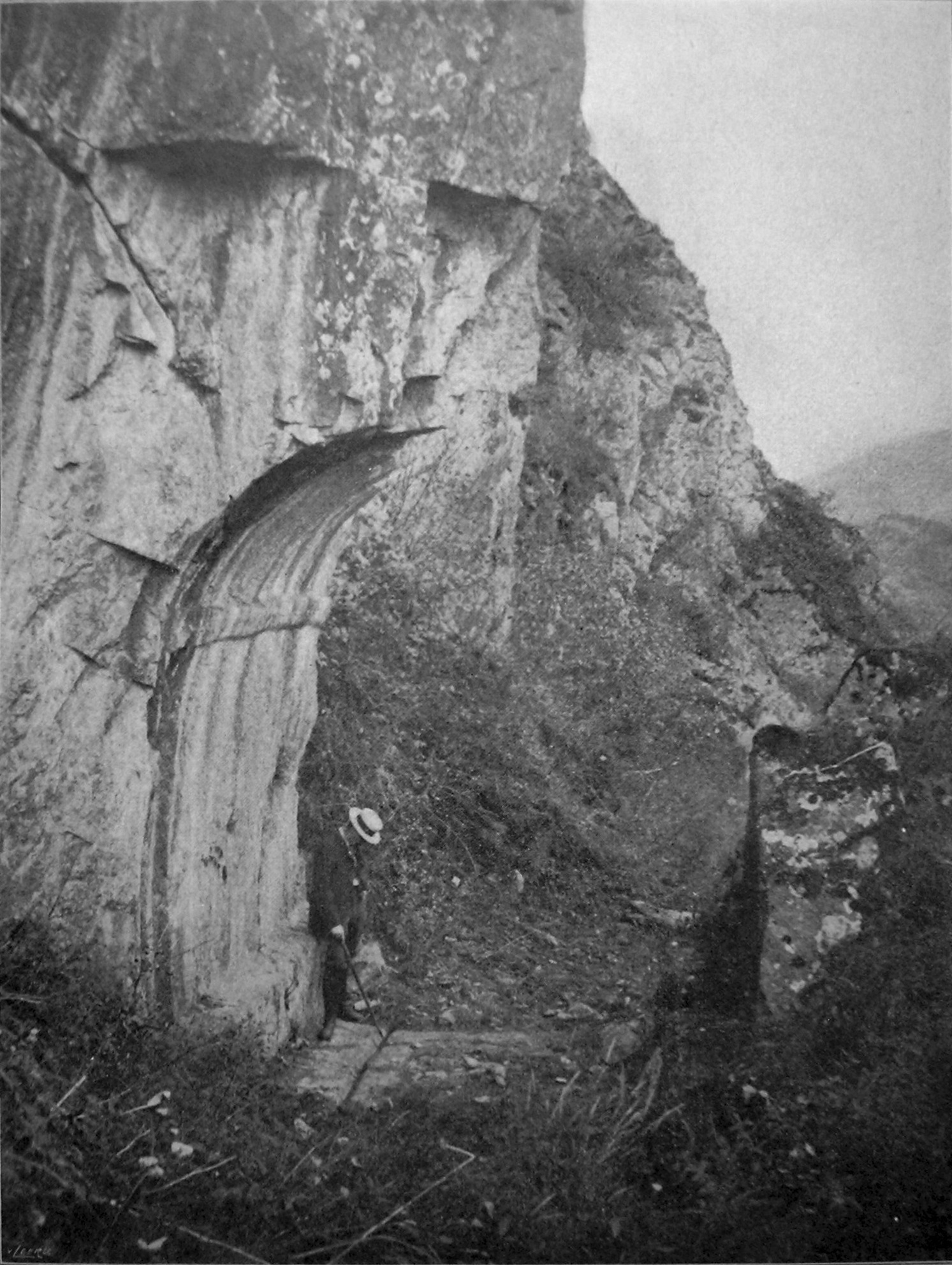 Porte Romaine de Bons, Mont-de-Lans, Isère, France.